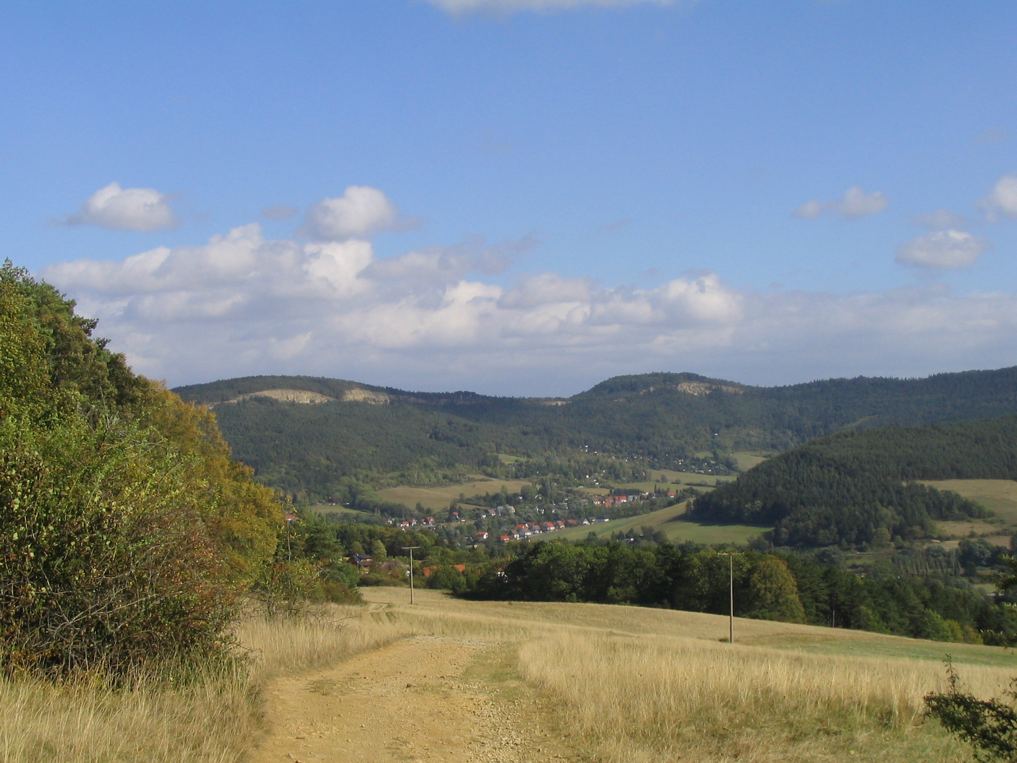 Plaue am Fuße der Reinsberge